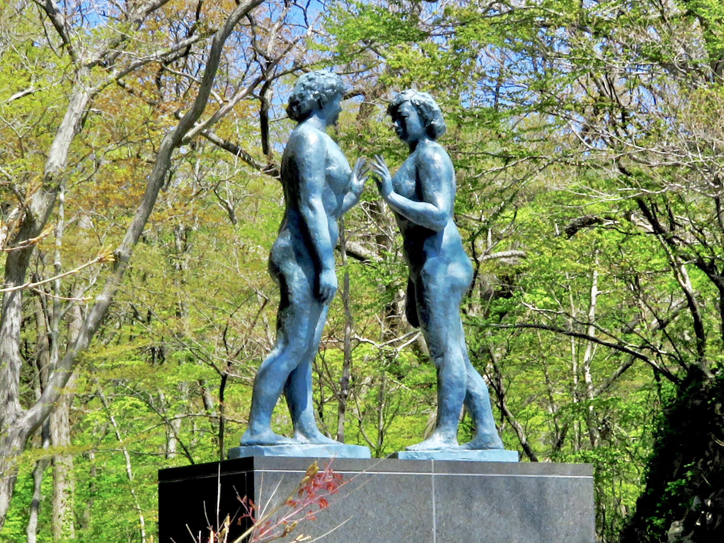 十和田湖 乙女の像 Canon PowerShot SX720 HS